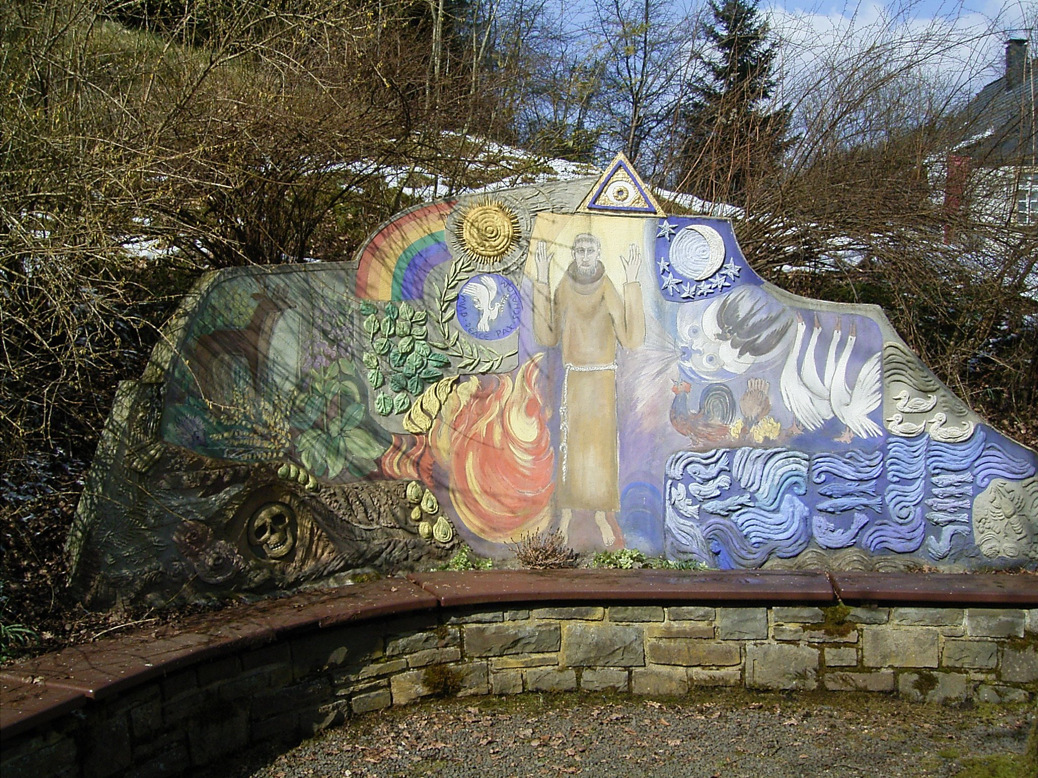 Kapelle Grotewiese in Meinerzhagen - Valbert